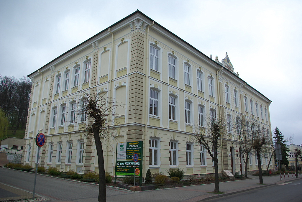 II LO Sanok widok od Mickiewicza z południowego-wschodu